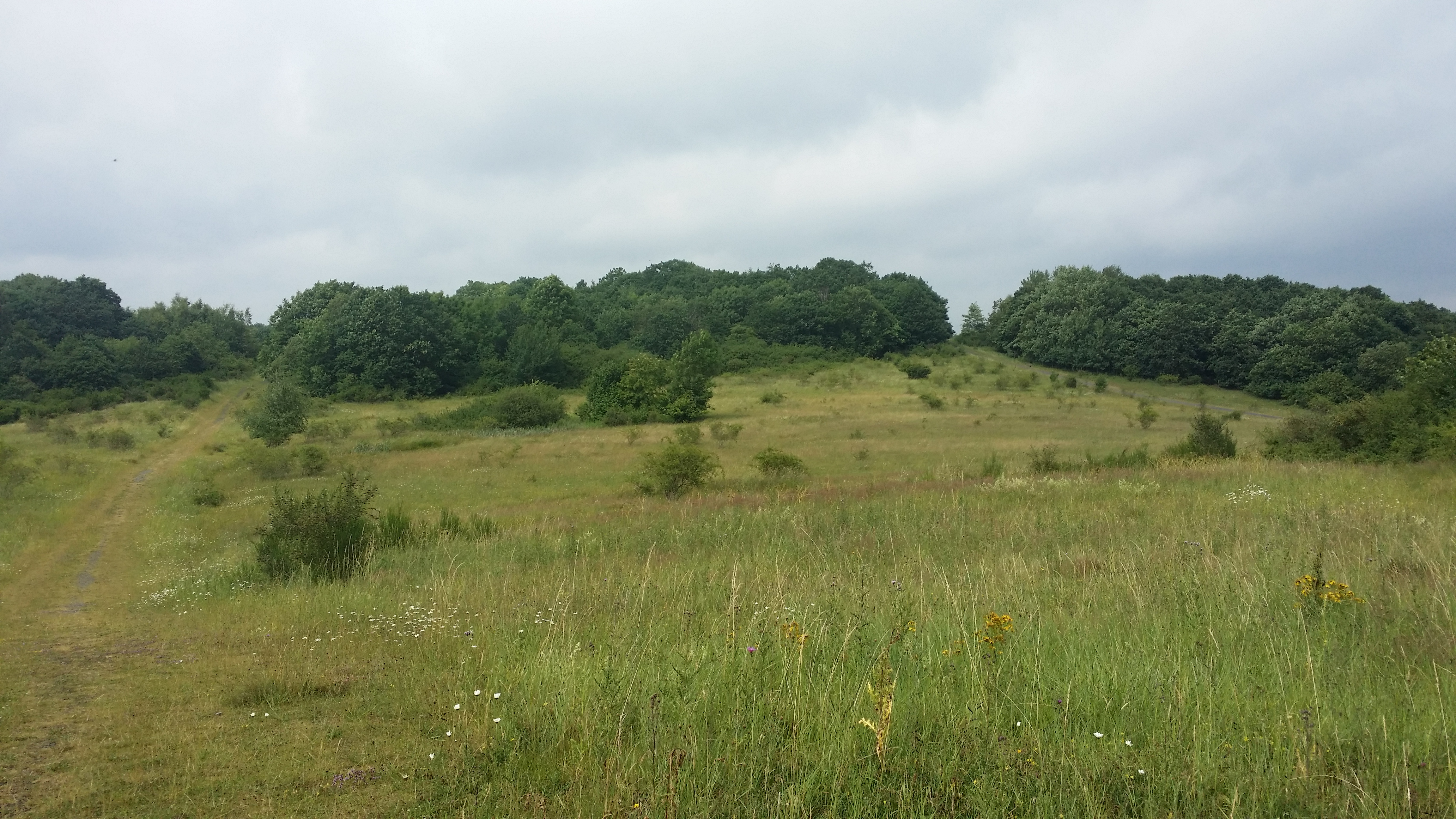 Nordwestbereich Naturschutzgebiet Spreiberg